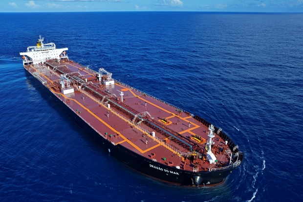 Sea Dragon